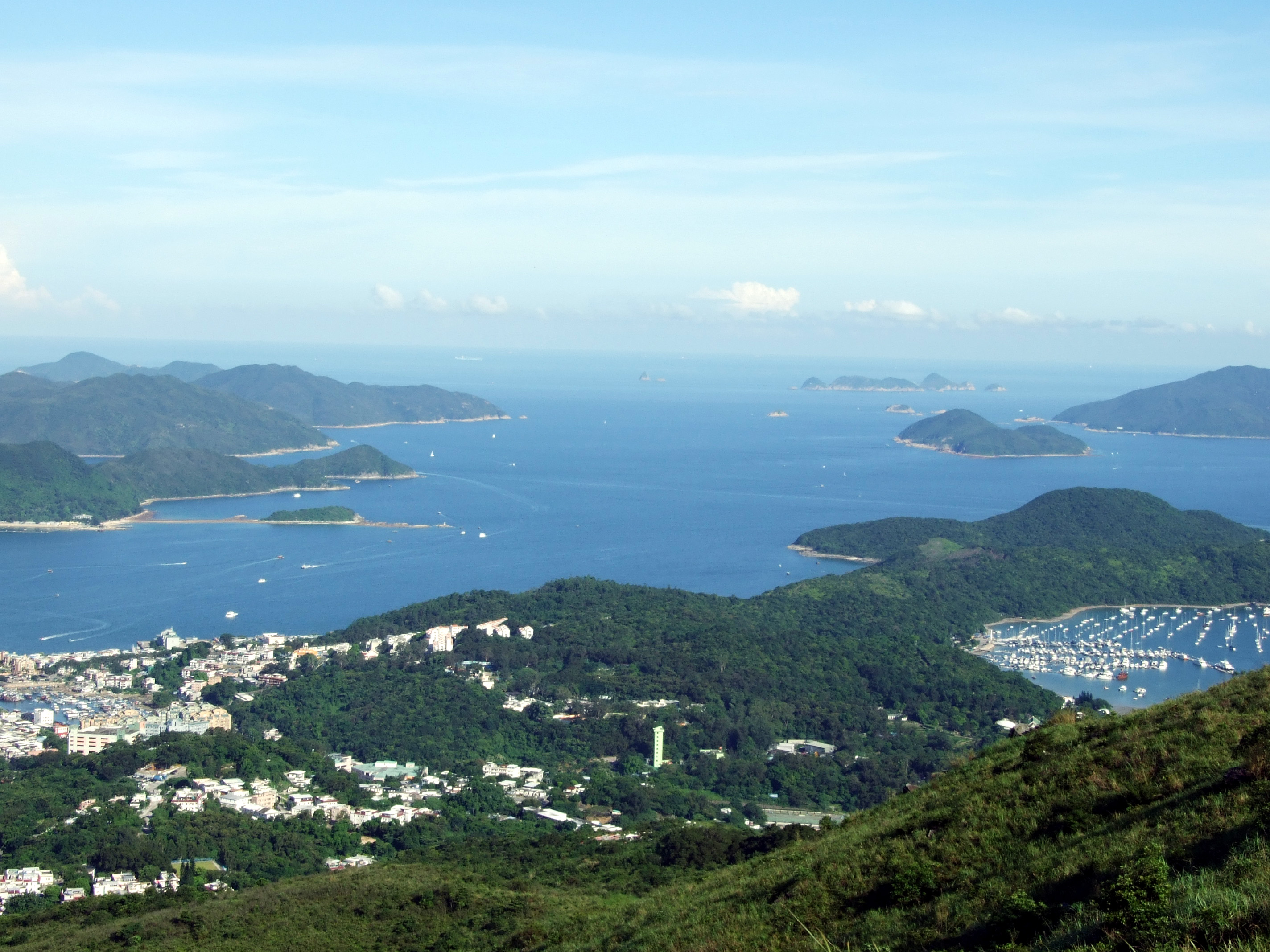 中文（香港）: 牛尾海